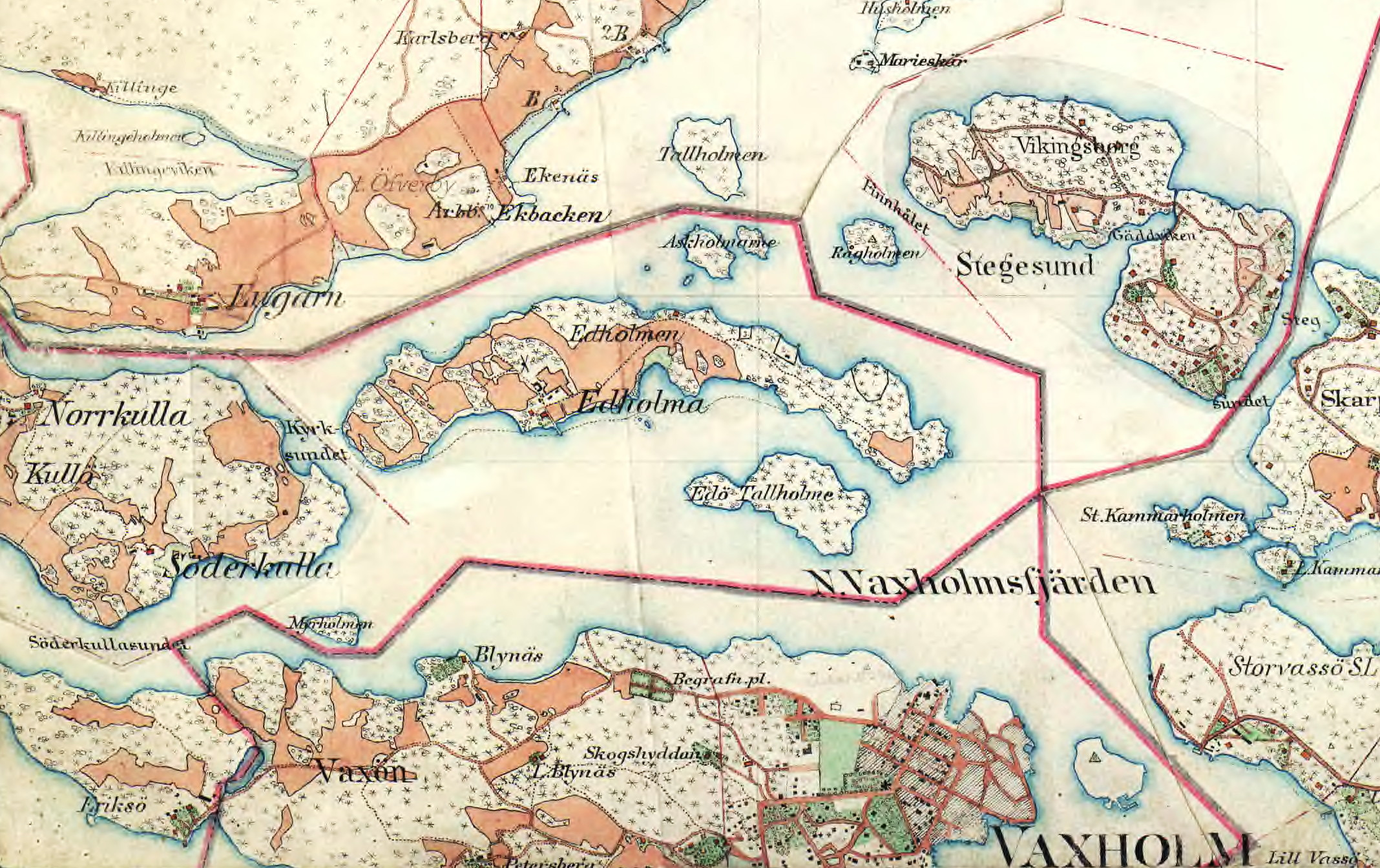 Edholma och omgivning på Häradsekonomiska kartan